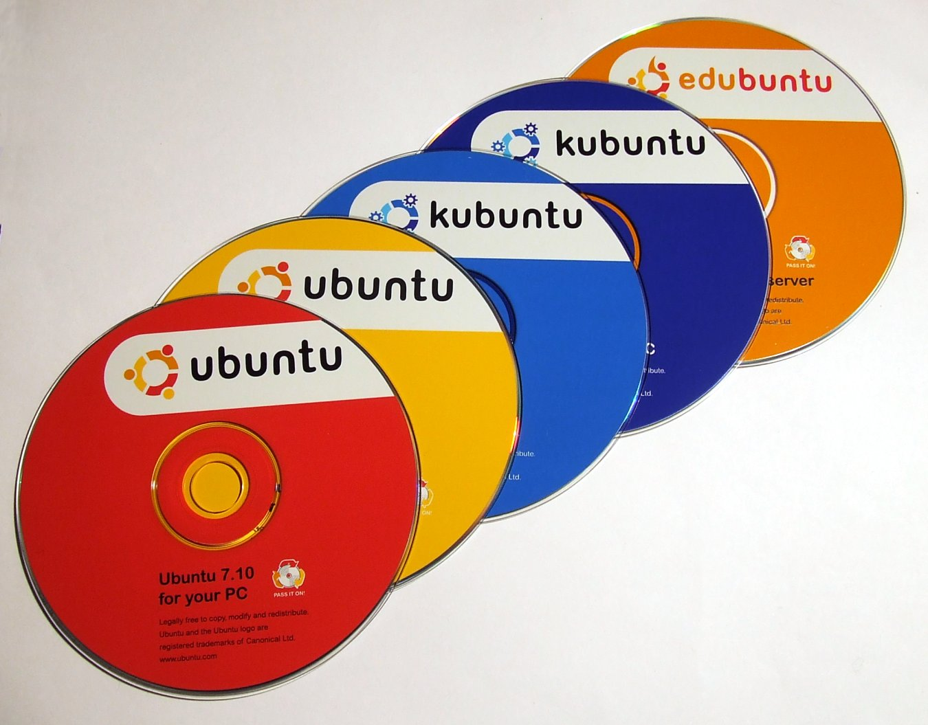 Licensing: This image or multimedia was created by Bartosz Senderek. The image or audio is licensed under CC-BY license. Attribution to me is required. Licencja: Ten obrazek lub plik multimedialny został stworzony przez Barotsza Senderka. Został on udostępniony na licencji CC-BY. Informacja o moim autorstwie jest wymagana. "I want to use the image/multimedia. How can I do that?" You can use this image/multimedia freely for any purpose, including commercial use, provided that you license it under the above license. My suggestion is to use text shown below: If you use the image I would appreciate it if you would let me know on my talk page, but this is not required as long as you follow the above license. "Chcę użyć tego pliku. Jak mogę to zrobić?" Możesz używać tej grafiki/multimediów darmowo w każdym celu, włączając użycie komercyjne, udostępniając go dalej na powyższej licencji. Jeśli zdecydujesz się na publikację zdjęcia mojego autorstwa obowiązkowo podpisz go w sposób podany w sekcji "Licensing text". Jeżeli użyłeś mojego pliku możesz powiadomić mnie o tym na mojej stronie dyskusji, lecz nie jest to wymagane, dopóki trzymasz się powyższej licencji.